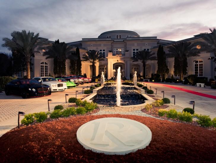 Simplesmente Incrível